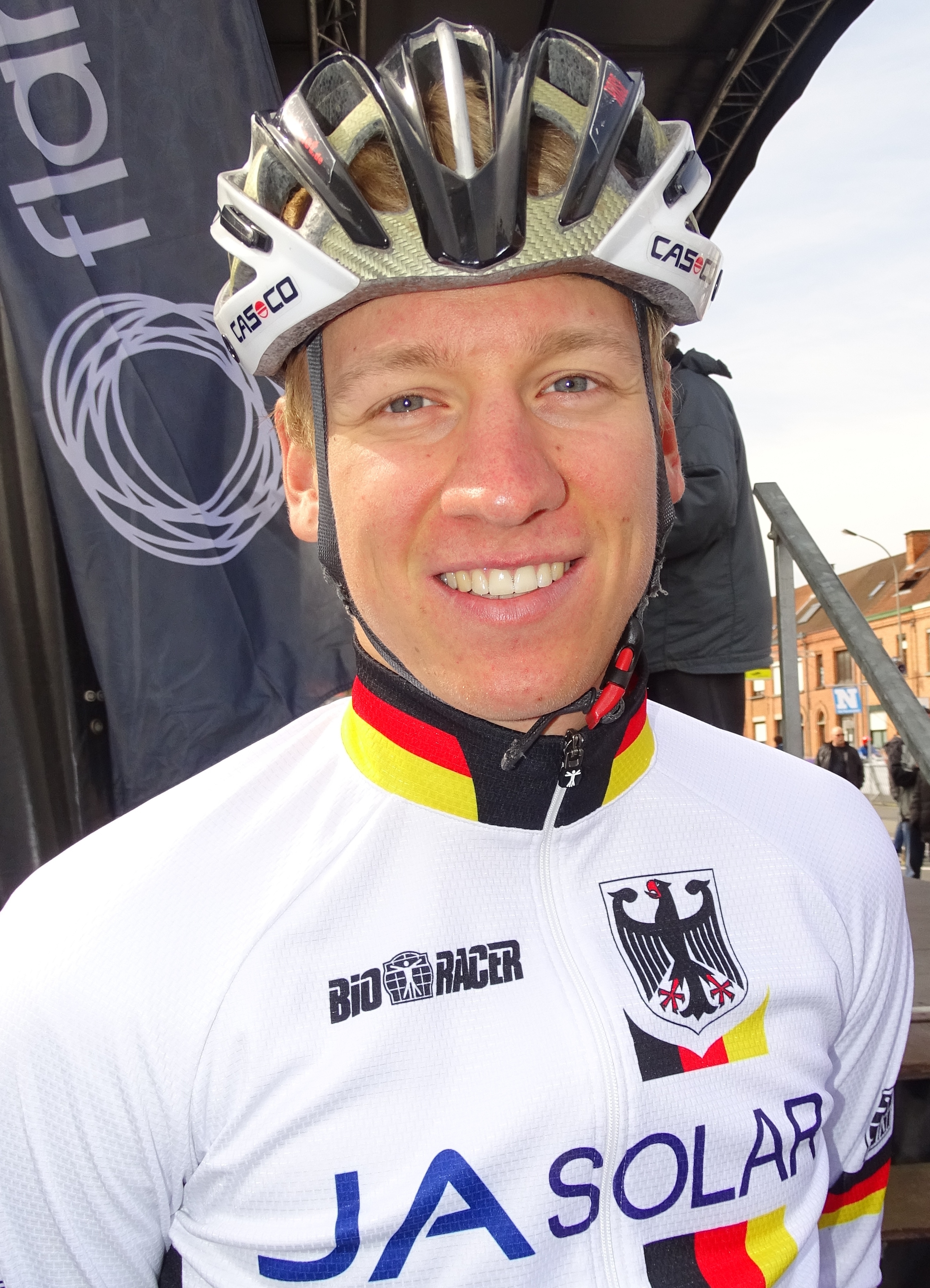 Reportage réalisé le samedi 9 avril à l'occasion du départ et de l'arrivée du Tour des Flandres espoirs 2016 à Audenarde, Belgique.